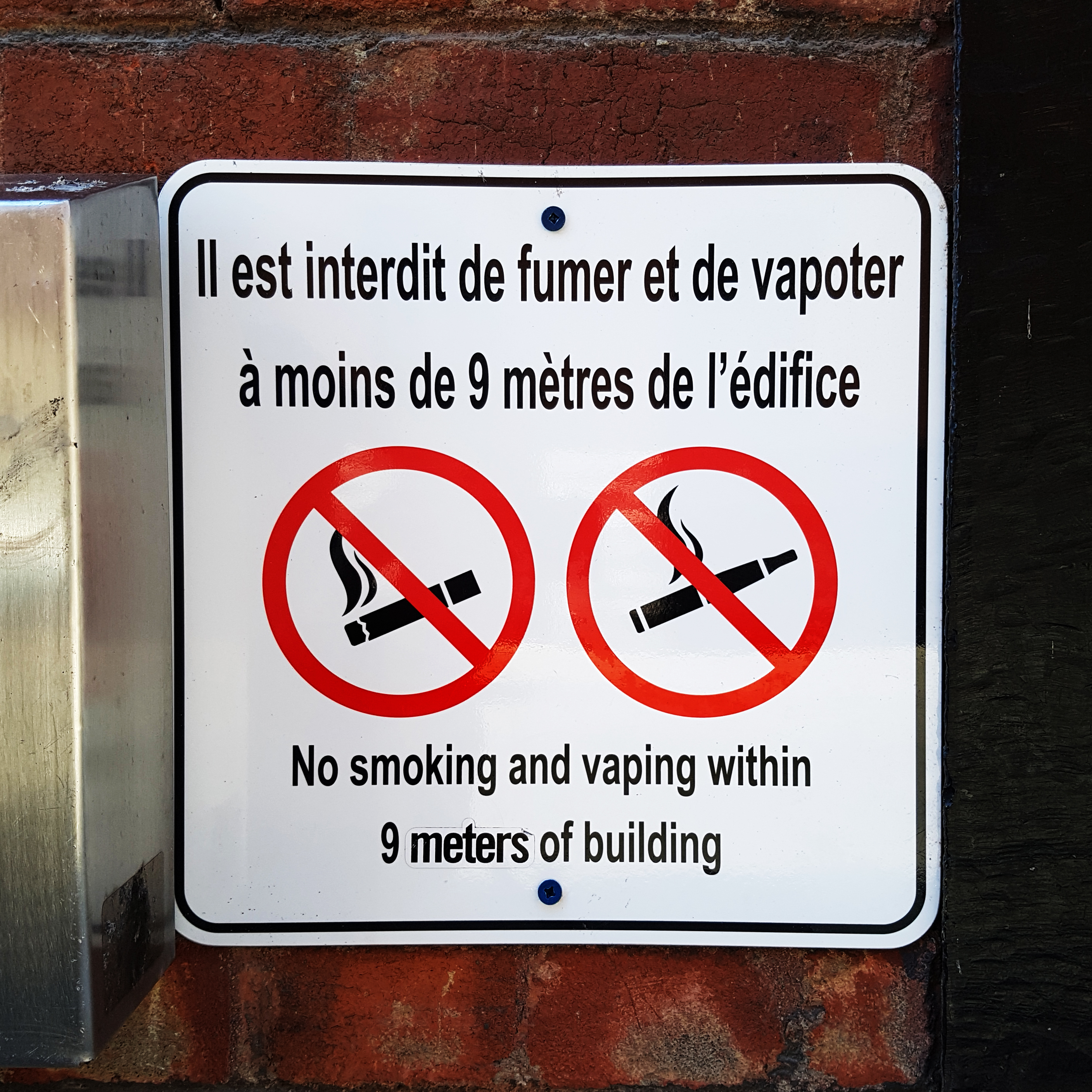 Montréal, 24 avril 2016. Montreal, 24 April 2016.